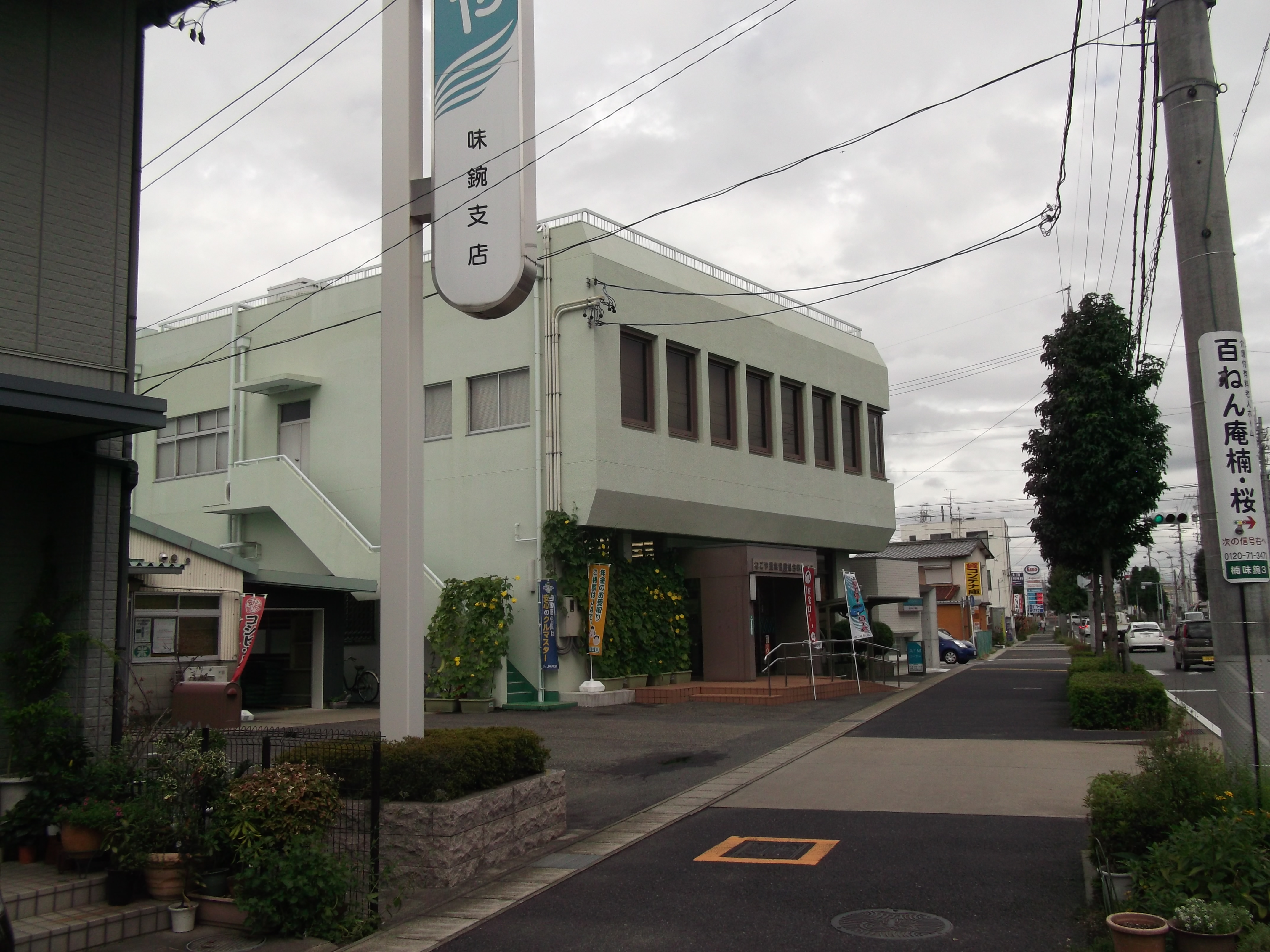 名古屋市北区楠味鋺三丁目にあるJAなごや味鋺支店を東側公道南側より撮影